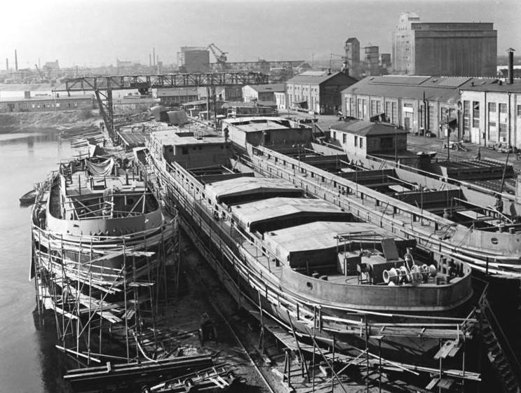 Magdeburg, Schiffswerft "Edgar Andrè" Zentralbild Ritter 21.3.1967 Magdeburg: Schiffswerft "Edgar Andrè" schloß 100-Millionen-Vertrag mit der UdSSR ab Die Schiffswerft "Edgar Andrè" hat im Februar dieses Jahres mit der sowjetischen Fischerei- und Binnenflotte einen 100-Millionen-Vertrag, für den Zeitraum bis 1970, abgeschlossen. Unser Bild zeigt die kleine Helling der Werft. Die Magdeburger Werft wird bis 1970 u.a. 34 Seeschlepper und 6 Motorgüterschiff an die Sowjetunion liefern. In Verwirklichung ihres Vertrages bringen die Schiffsbauer einen neuen Hochseeschlepper mit 750-PS-Antriebsleistung auf den Wltmarkt, der die höchste Klassifizierung für den Einsatz auf allen Gewässern besitzt.